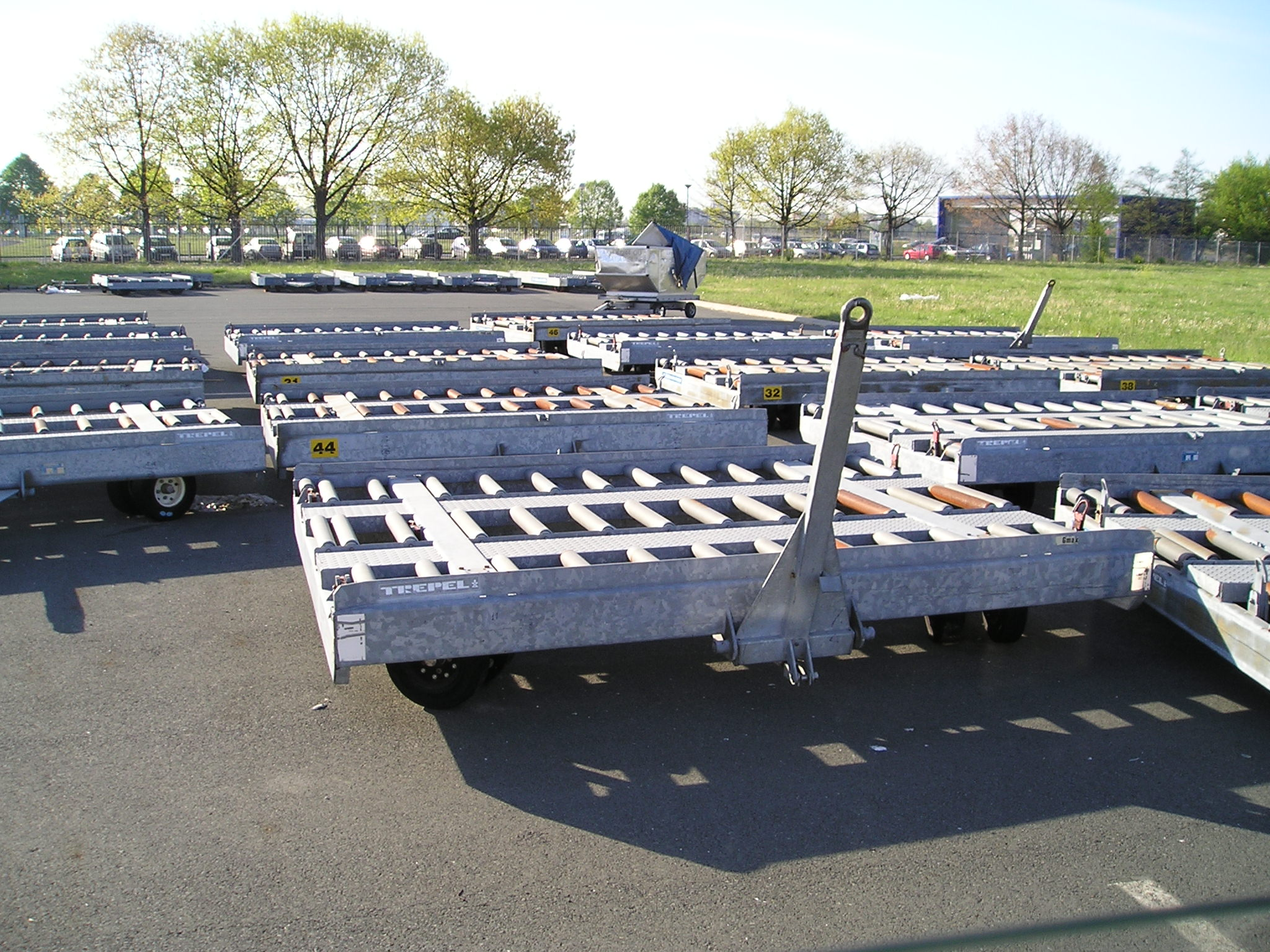 Pallet cargo dollies